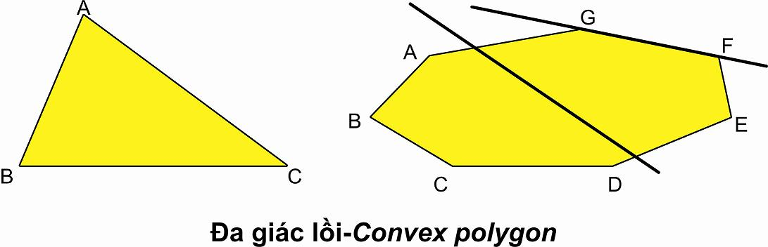 Đa giác lồi-Convex polygon